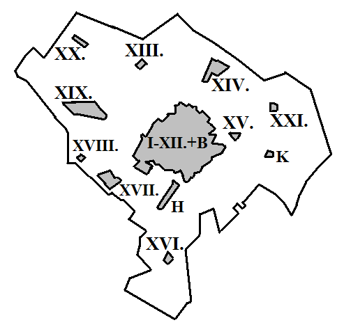 Kecskemét külterületei a klasszikus kerületszámozással